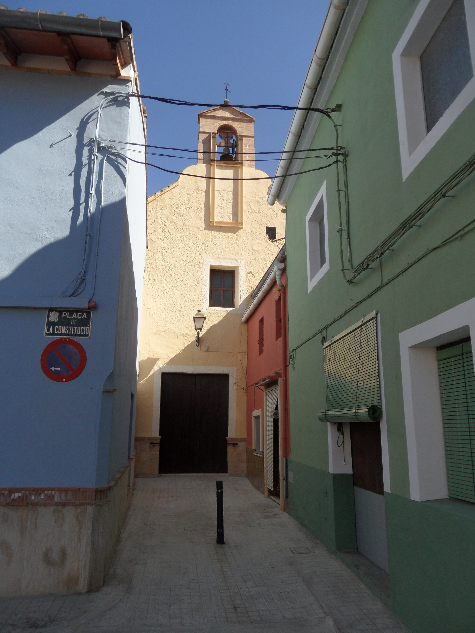 Església d'Annauir.